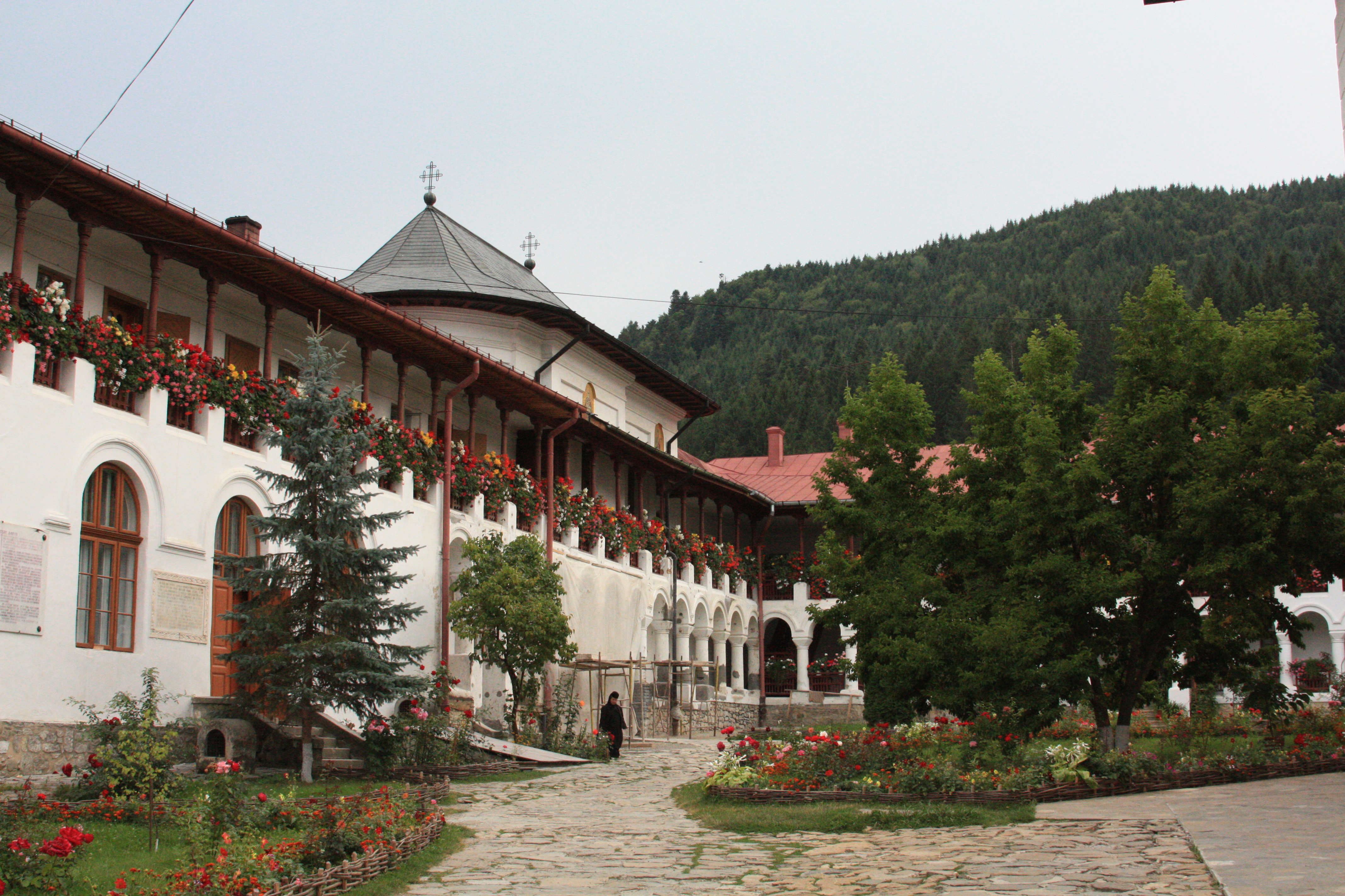 Monastère AgapiaRomână: Mănăstirea Agapia